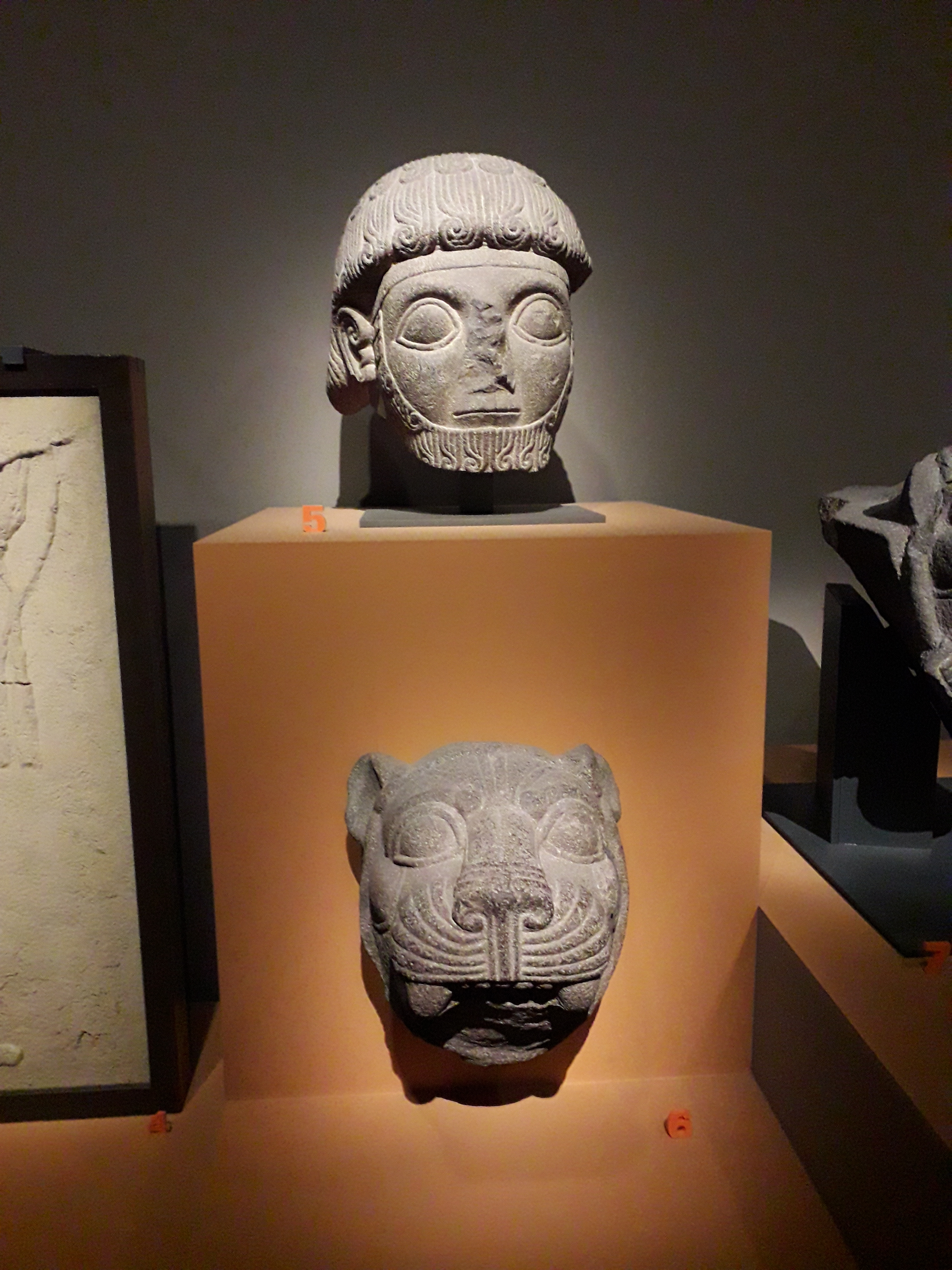 Fragments de la statue monumentale du roi Katuwa retrouvée dans les ruines de la ville antique de Karkemish, dans l'actuelle Turquie. Basalte. Vers 925 avant J.-C. Londres. British Museum, 1927, 11.14.6. Exposé au Musée du Louvre en 2019 dans le cadre de l'exposition "Royaumes oubliés. De l'empire hittite aux Araméens". Légende dans cette exposition : "Cet ensemble de fragments appartenait autrefois à une statue funéraire de souverain. La base de la statue se trouvait toujours en place le long de la partie nord de la "Processional Entry" du complexe de la "King's Gate" lors des fouilles britanniques entreprises en 1911. La statue qui la surmontait à l'origine avait été brisée et Léonard Woolley en avait retrouvé les morceaux éparpillés tout autour. En 1914, l'équipe avait entamé une restauration de l'ensemble, mais la Première guerre mondiale avait interrompu leurs travaux. Quand les Britanniques revinrent sur le site, la statue avait de nouveau été détruite et la restauration ne put être reprise. La statue a été sculptée pour le compte de Katuwa, roi de Karkemish. Elle ne représente vraisemblablement pas Katuwa lui-même, mais un de ses ancêtres appartenant comme lui à la maison de Suhi, la dynastie qui a détrôné les rois descendant des anciens gouverneurs hittites. Le roi était figuré debout sur des lions, exactement comme les dieux le sont sur le dos de leurs animaux attributs. Cette statue est donc le portrait d'un roi ancien divinisé auquel un culte était rendu. Katuwa avait choisi de l'installer dans l'espace public, pour faire de cette image de l'un des fondateurs de sa lignée un élément de cohésion sociale, le roi divinisé devenant le protecteur de la cité et de l'Etat."